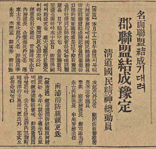 국민정신총동원연맹 청도군지부 예하 각 읍면지부 결성목적으로 국민정신총동원연맹 청도군지부를 군연맹으로 결성하는 기사